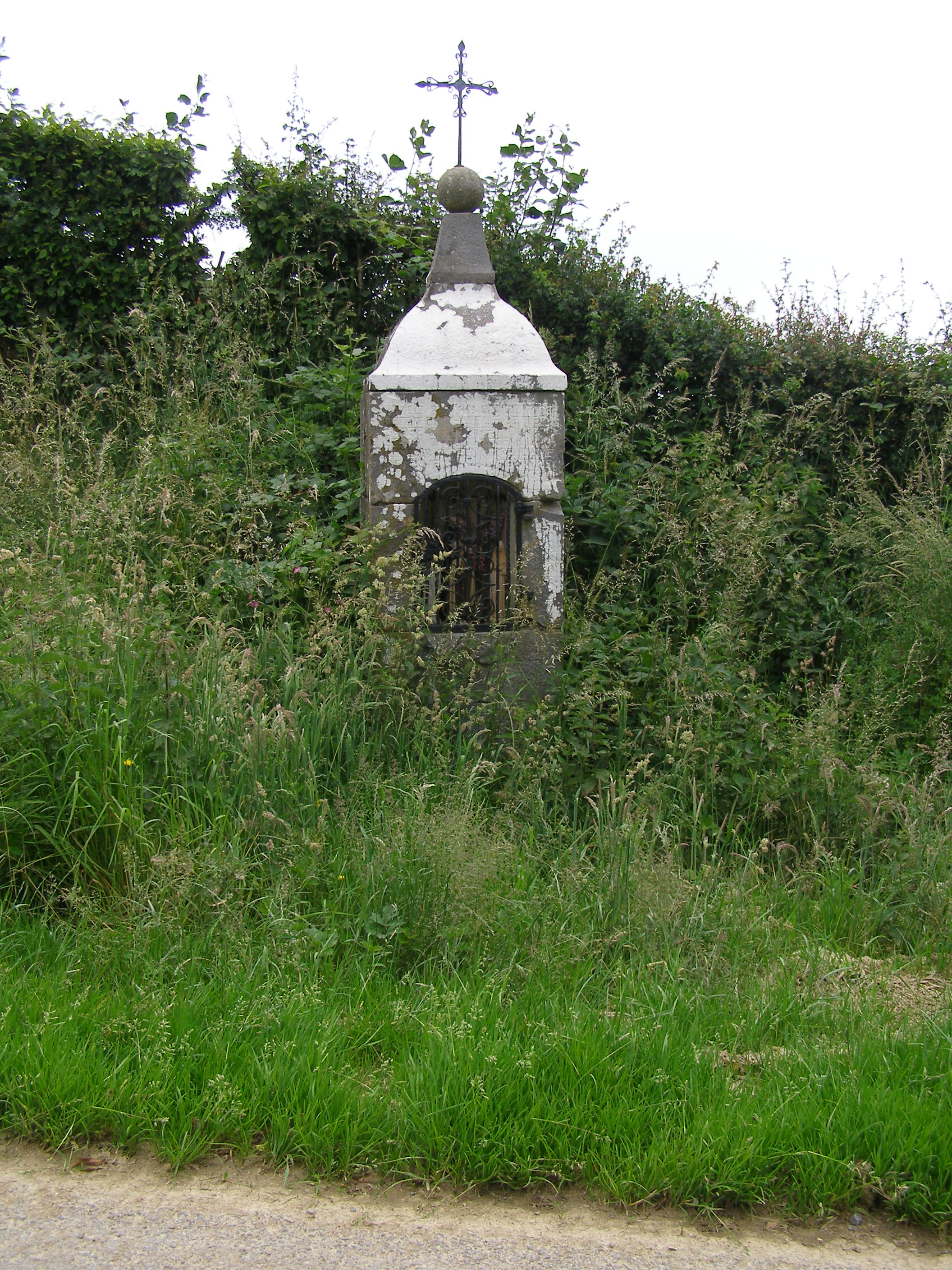 Oratoire.